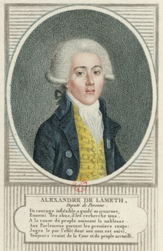 Alexandre de Lameth député de Péronne, estampe, pointillé, roulette.